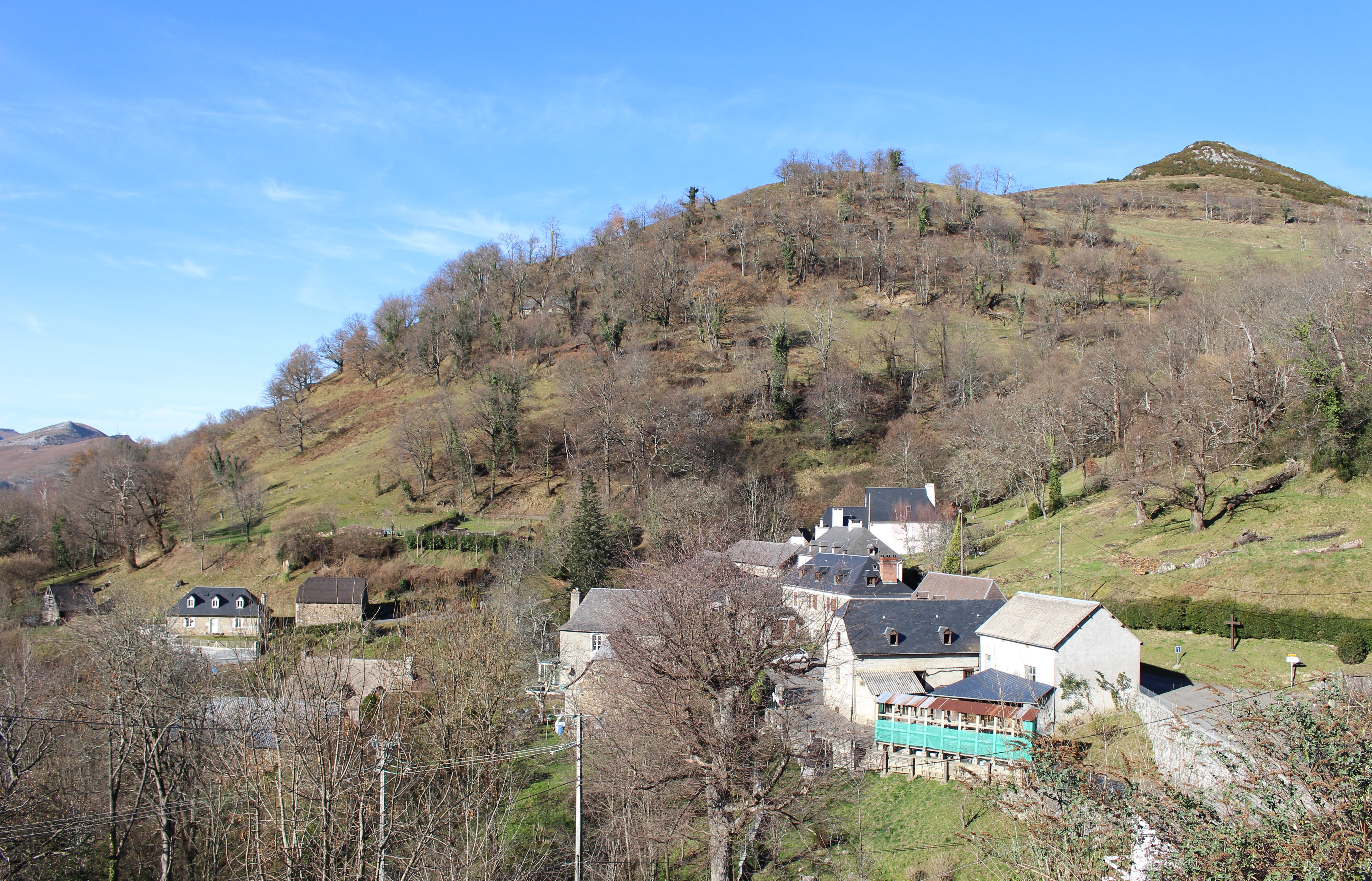 Antalos (Hautes-Pyrénées)